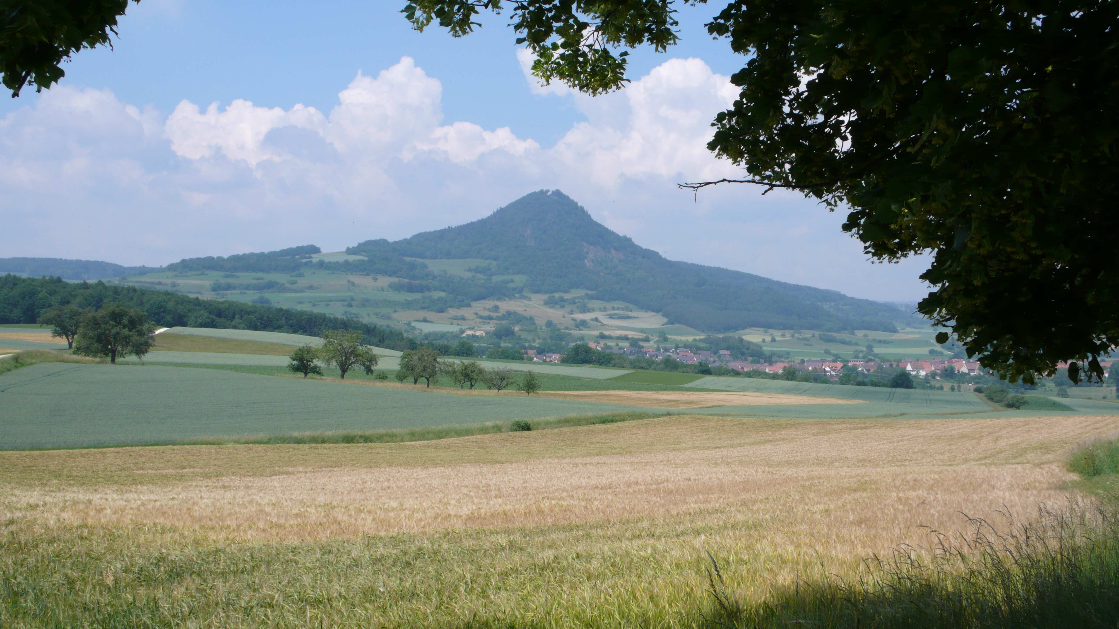 Blick zum Hohenhewen; Gipfel im NSG „Hohenhewen“, Umgebung weitgehend im LSG „Hegau“